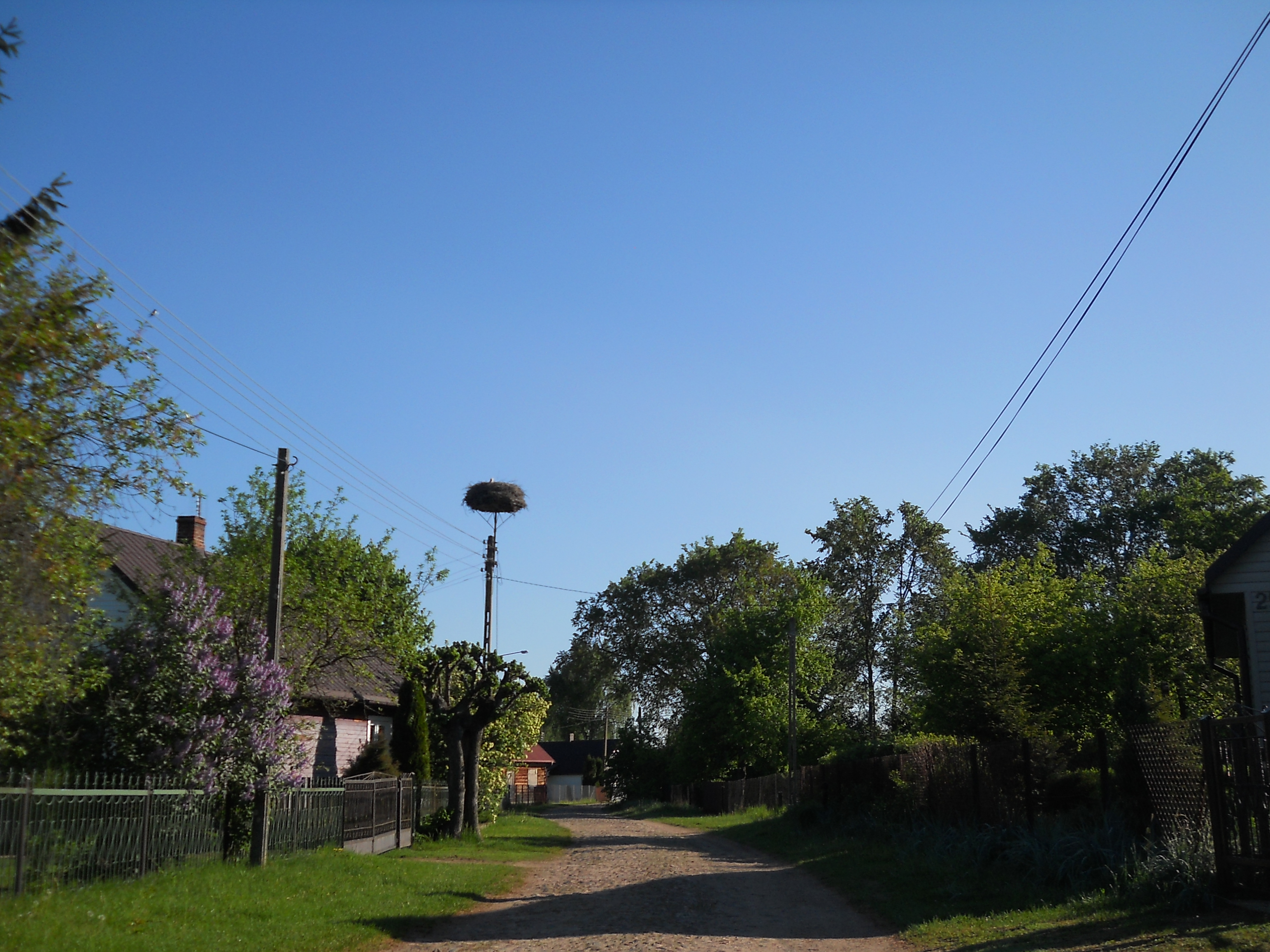 Skaryszewo